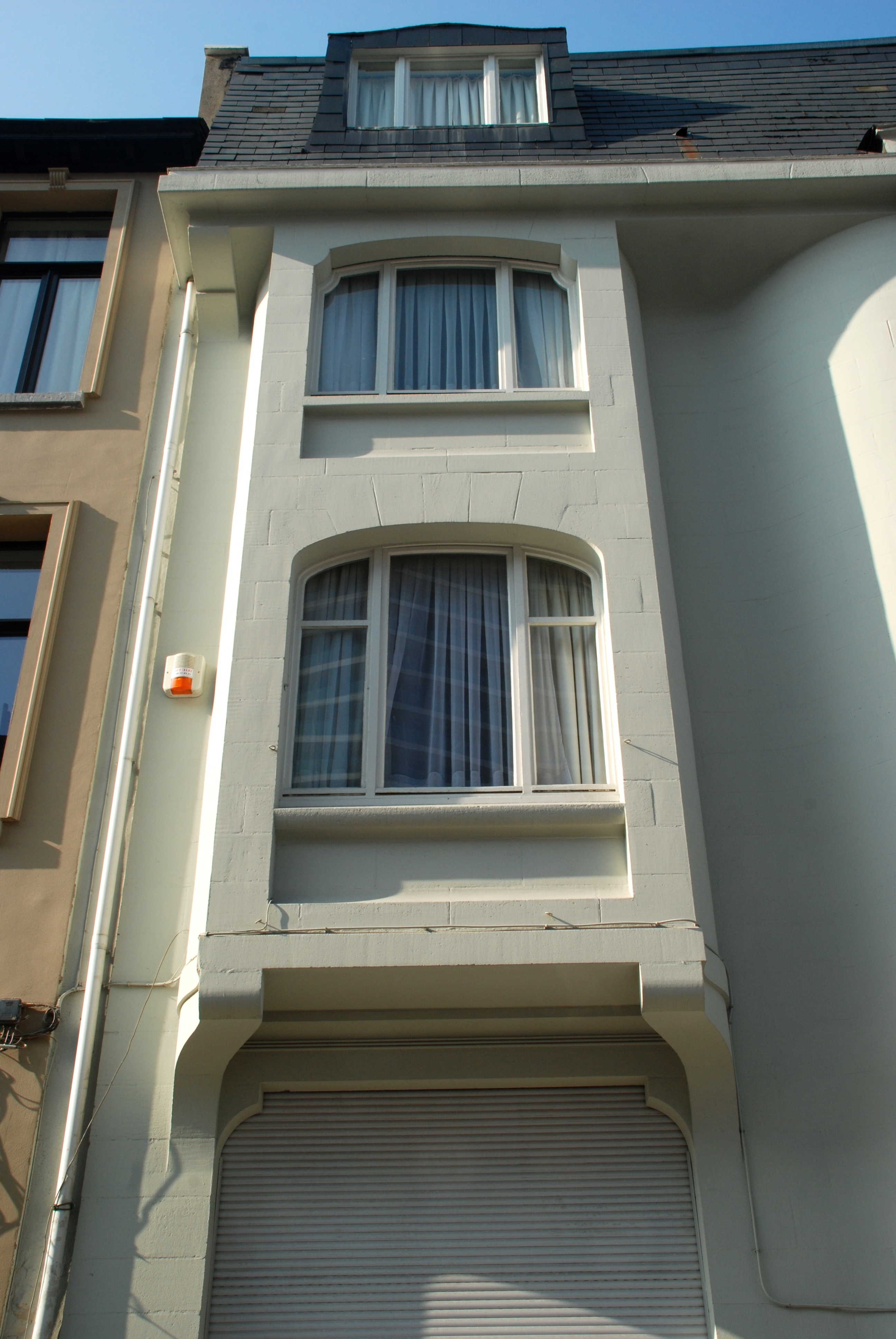 Belgique - Bruxelles - Maison Van Rysselberghe